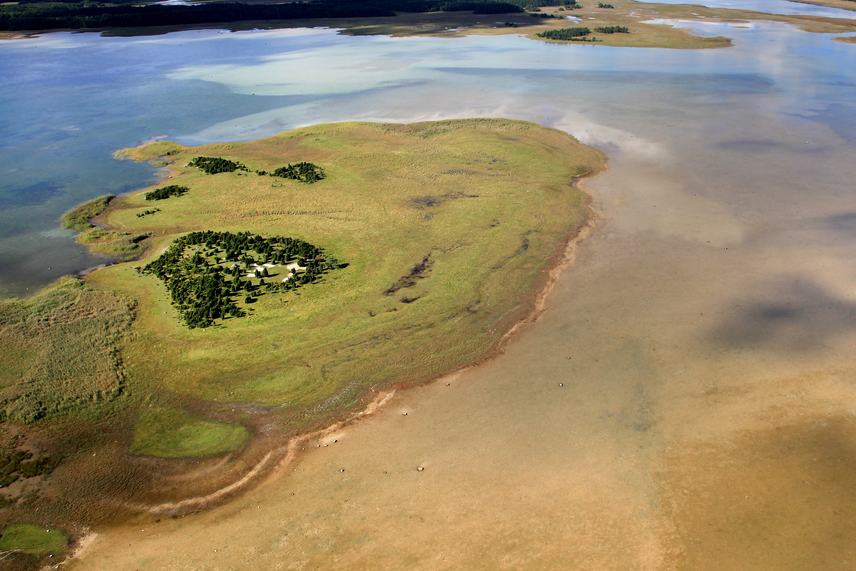 Ruserahu